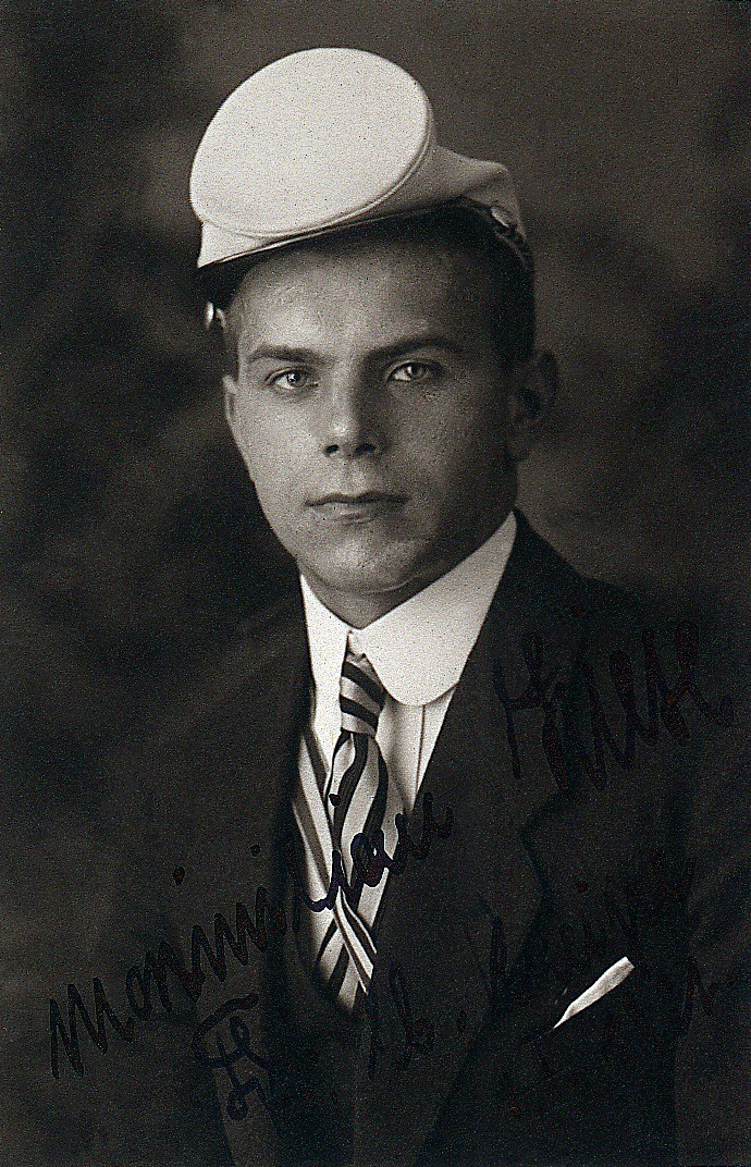 Maximillian Ziese (1901-1955), deutscher Dramatiker und Schriftsteller